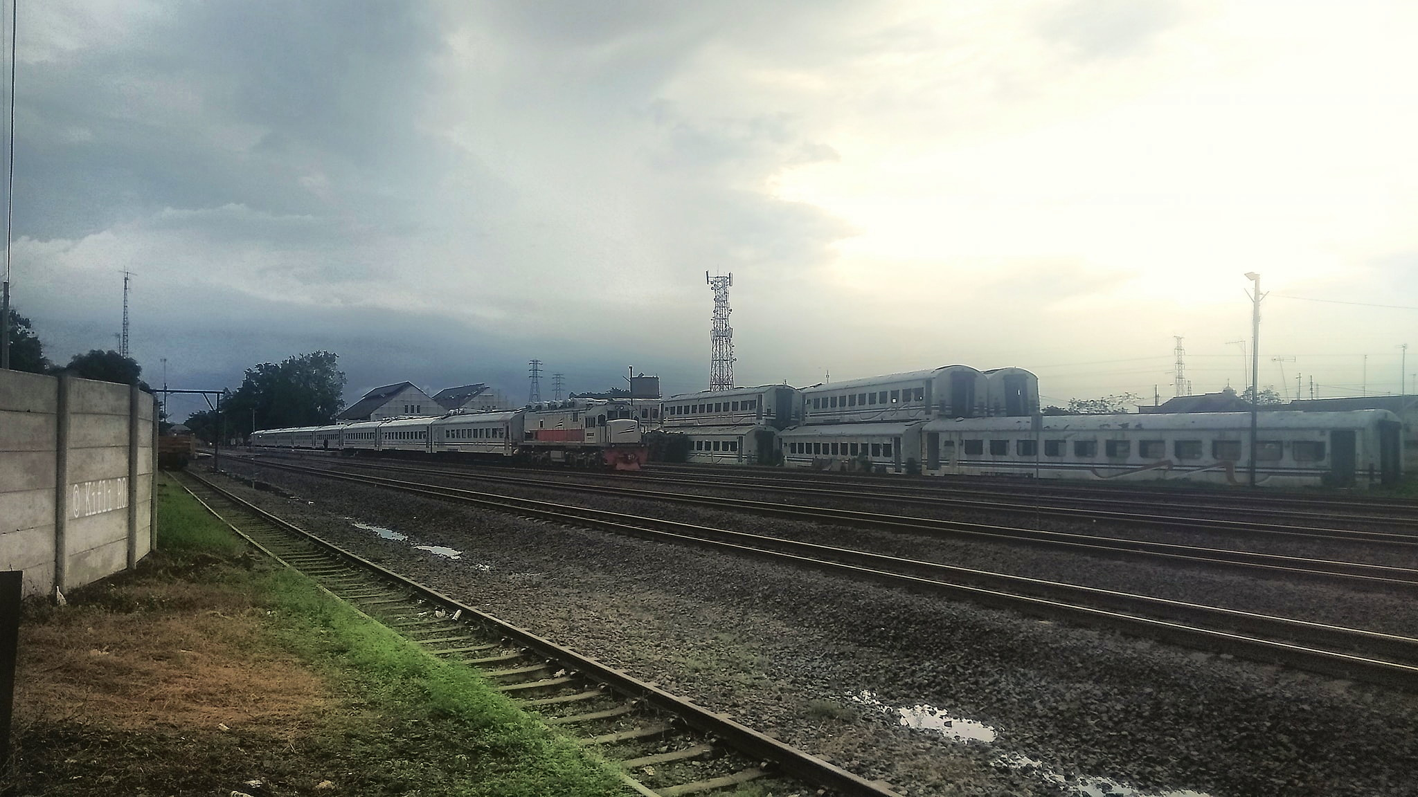 Kereta api